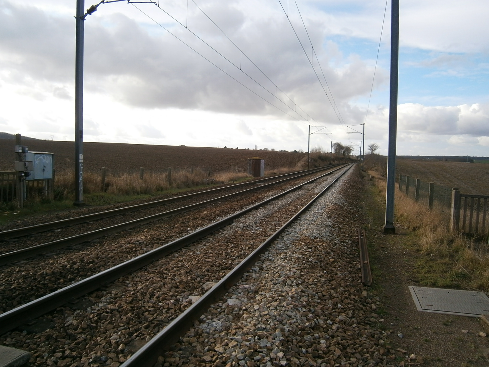 La ligne de Saint-Cyr à Surdon (vue en direction de Surdon), au passage à niveau n° 7, à Saint-Germain-de-la-Grange (78).